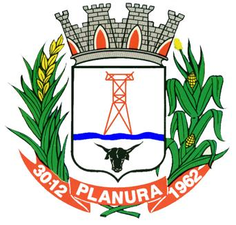 Brasão de armas do município de Planura, MInas Gerais, Brasil.